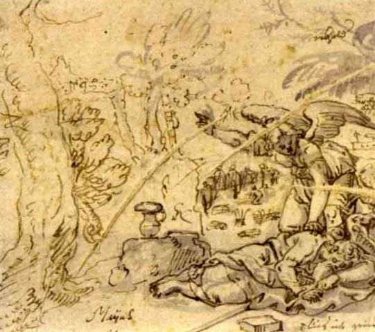 Der Traum des Eliaslabel QS:Lde,"Der Traum des Elias"